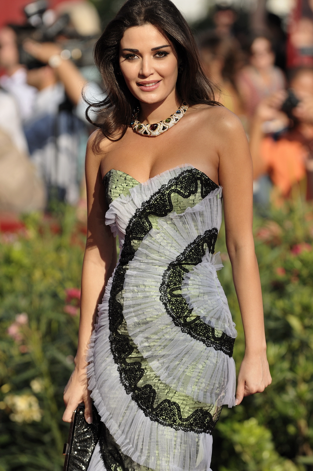 66ème Festival du Cinéma de Venise (Mostra), 9ème jour (10/09/2009) Tapis rouge avec Omar Sharif et Cyrine AbdelNour pour le film The Traveller de Ahmed Maher